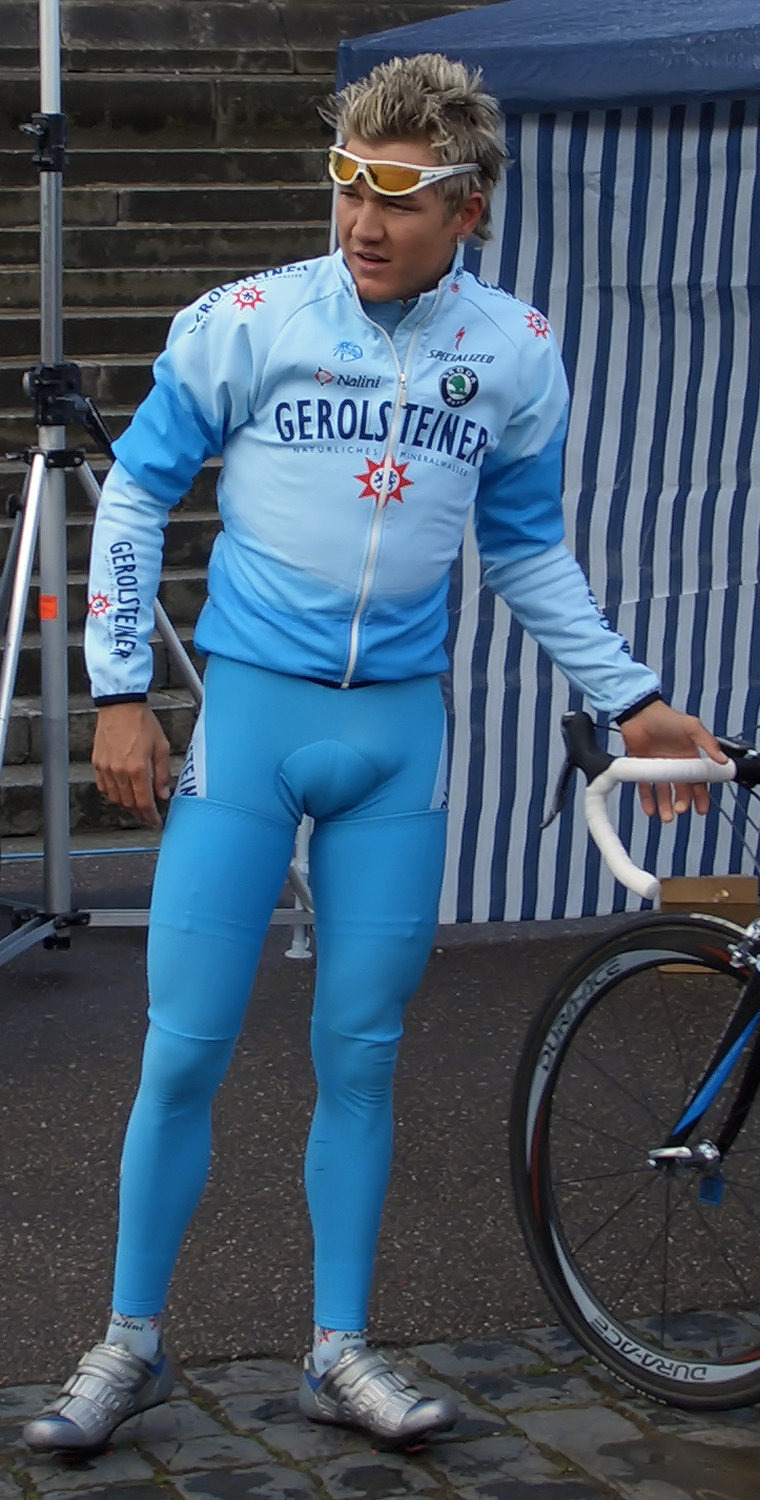 Heinrich Haussler at race in Germany